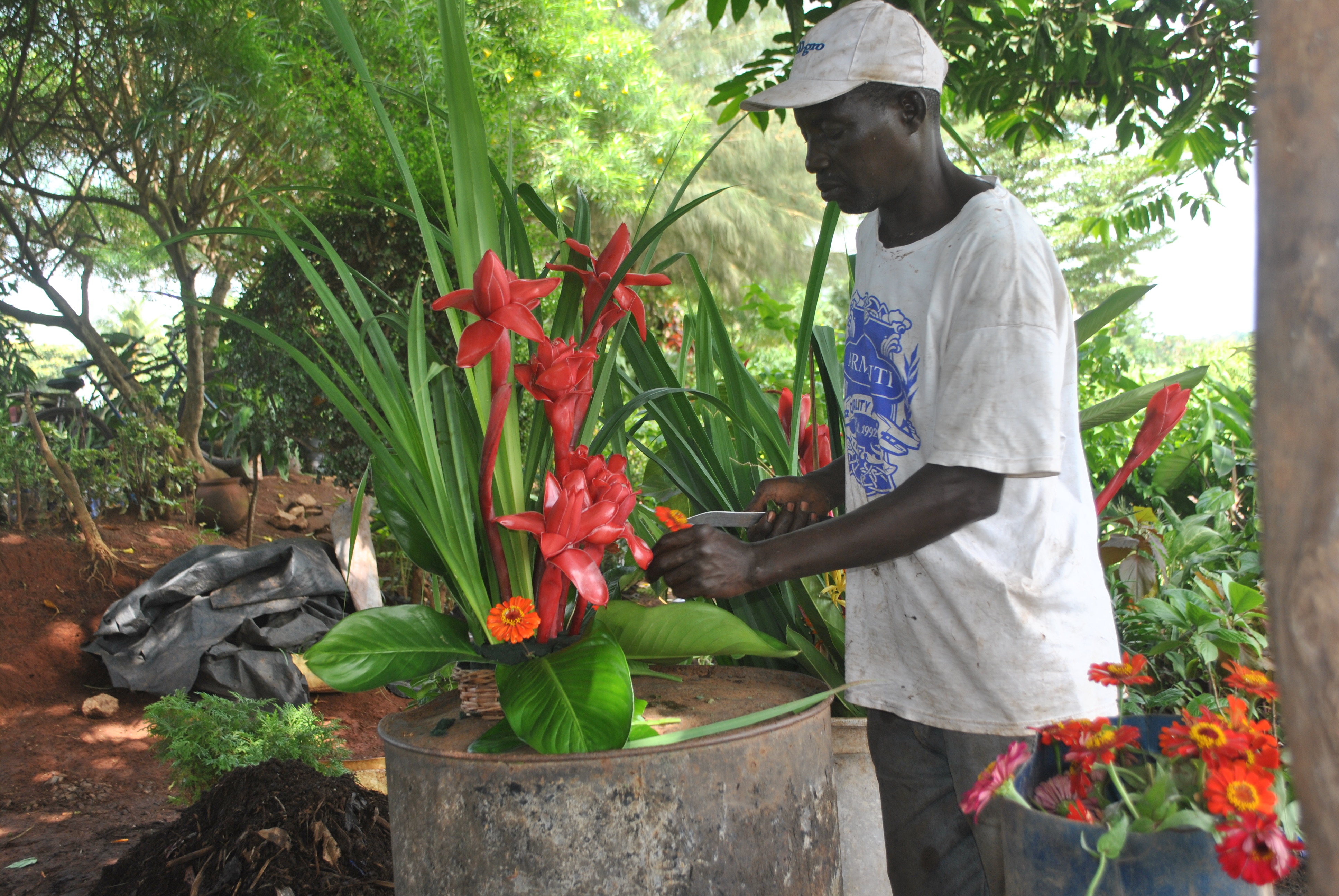 Un marchand de fleurs de Yamoussoukro, ville du centre de la Côte d'Ivoire.